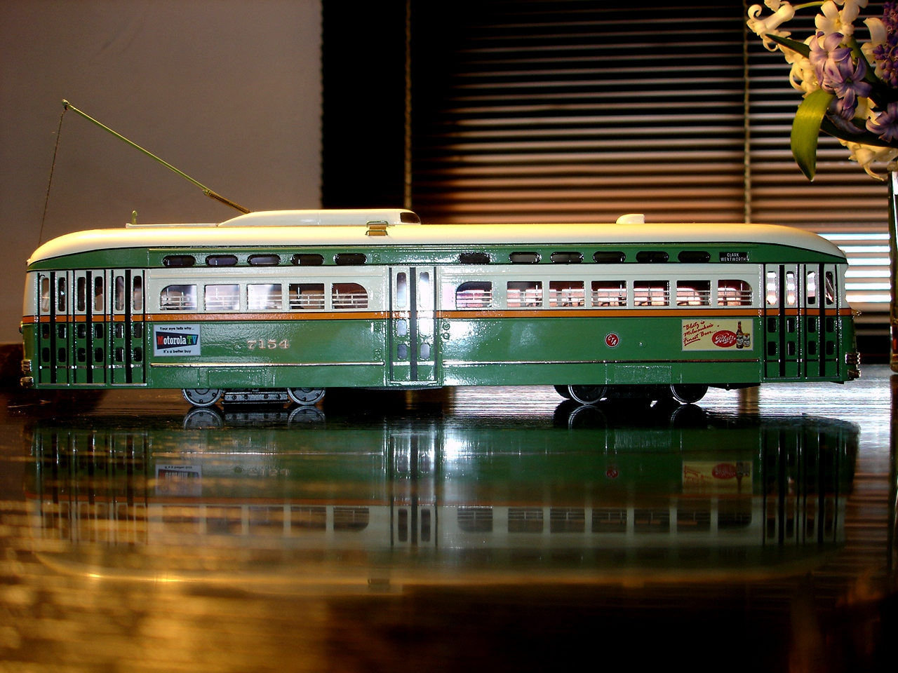 Zelfgemaakte foto.